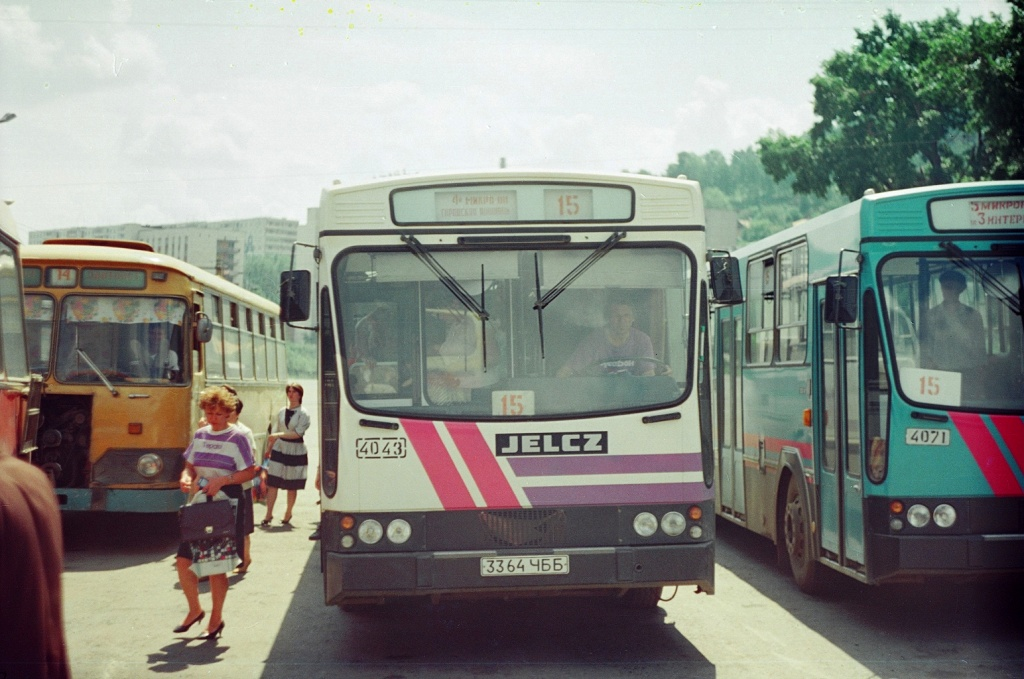 Автобусы Ельч на городской площади в Златоусте